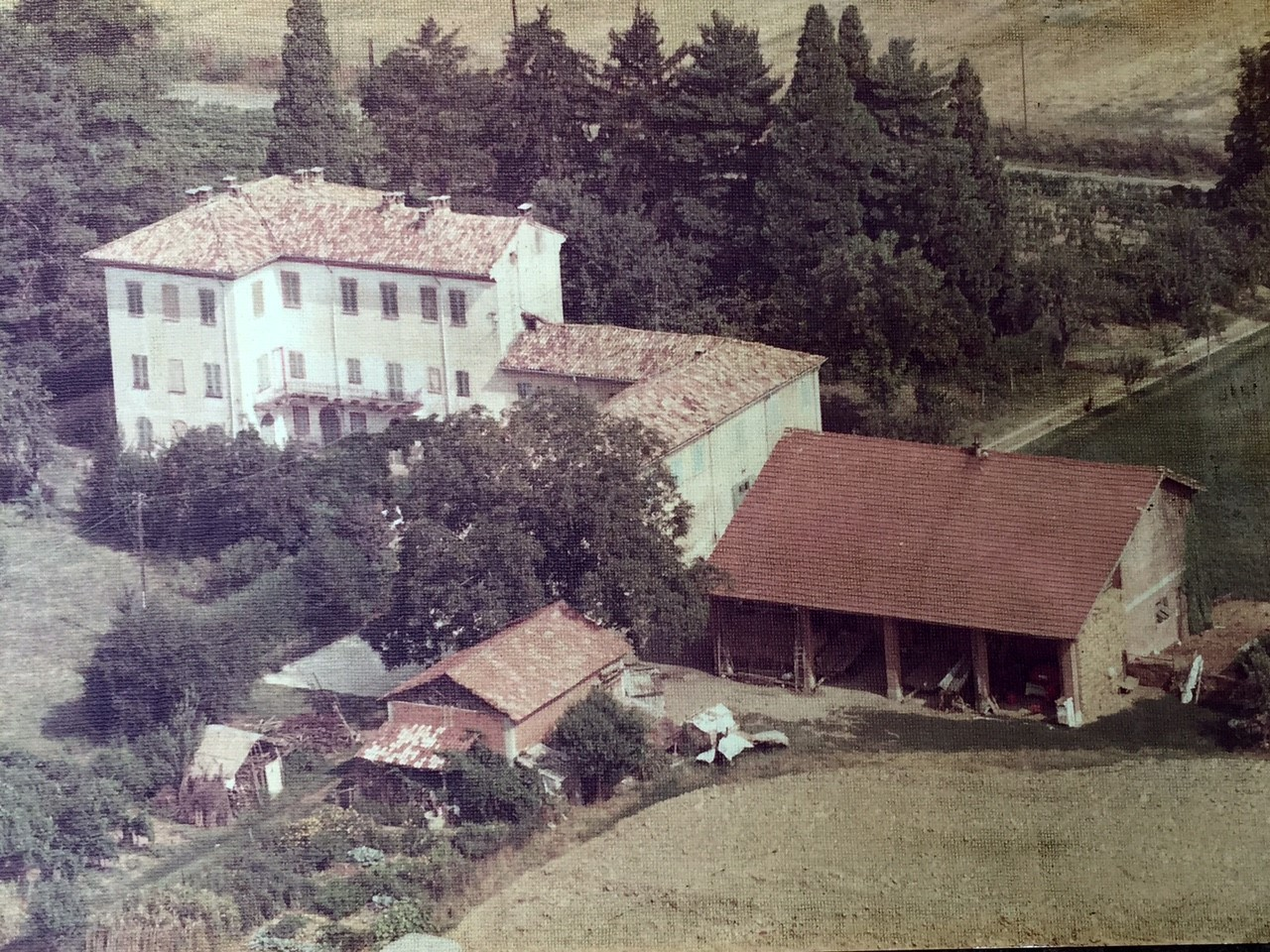 Cascina dell'Orefice - immagine prima della ristrutturazione